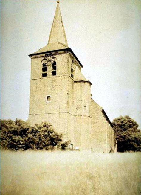 Sint-Hubertuskapel te Liessel, afgebroken in 1903.